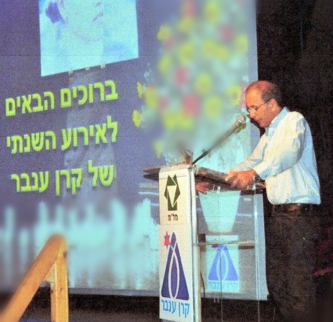 שוחט נואם באירוע שנתי של קרן ענבר 2012